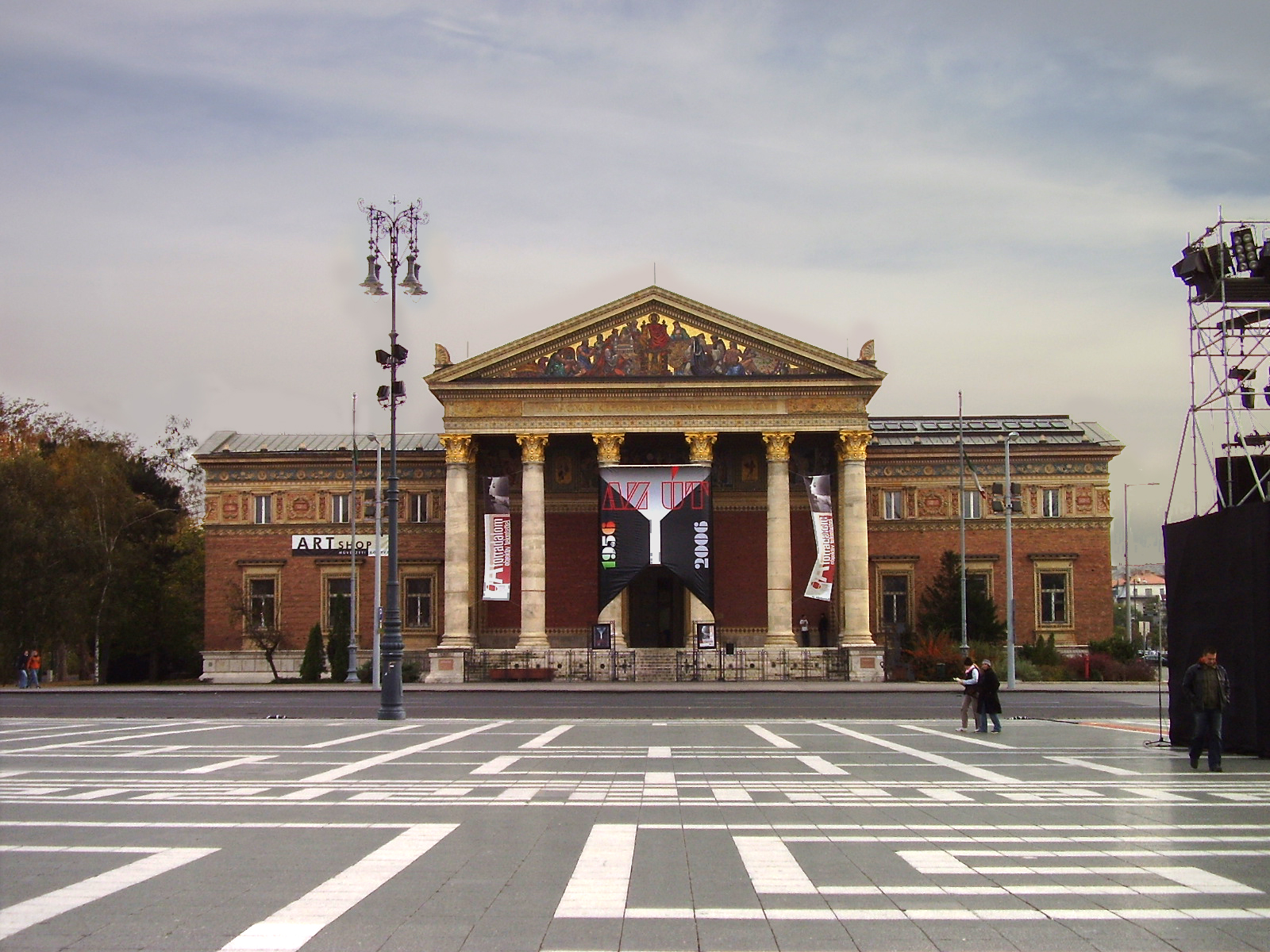 Budapest 4 november 2006